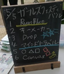 amiinaセトリボード(20150505(1))